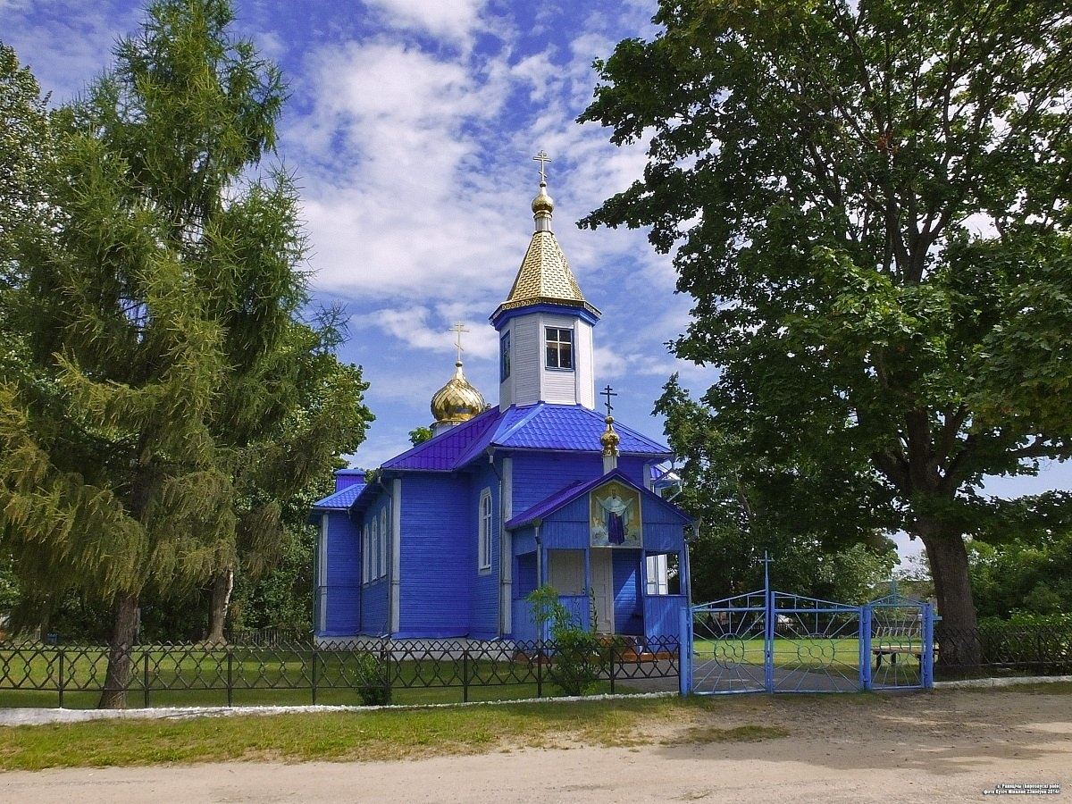 Равяцічы. Свята-Пакроўская царква